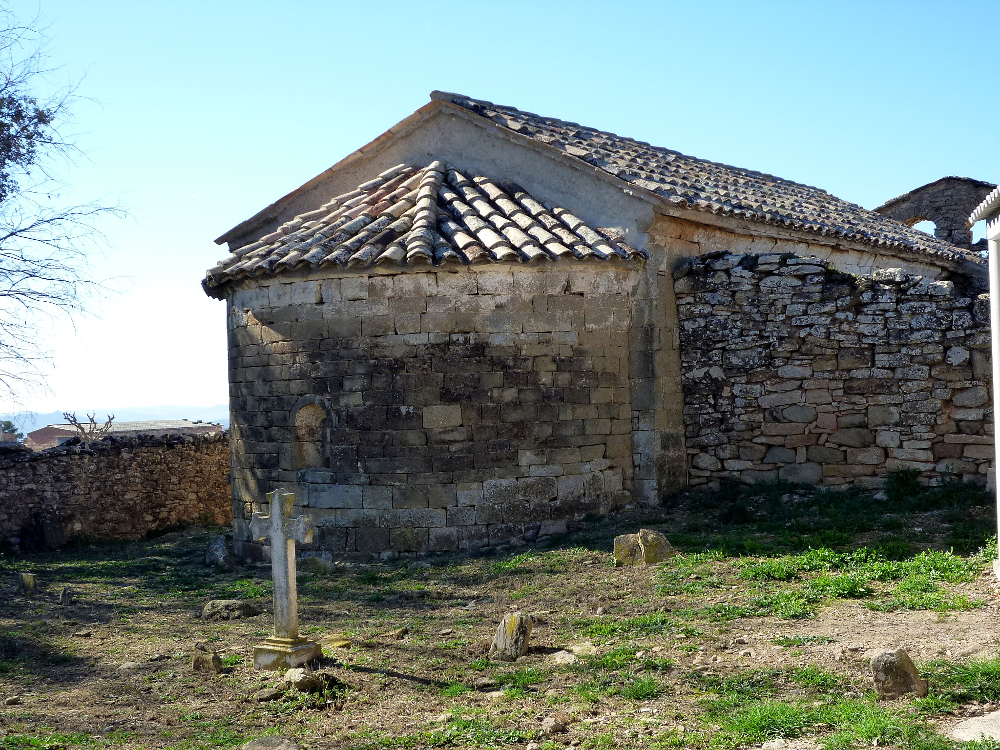 Santuari de la Mare de Déu de la Vedrenya (Artesa de Segre): absis